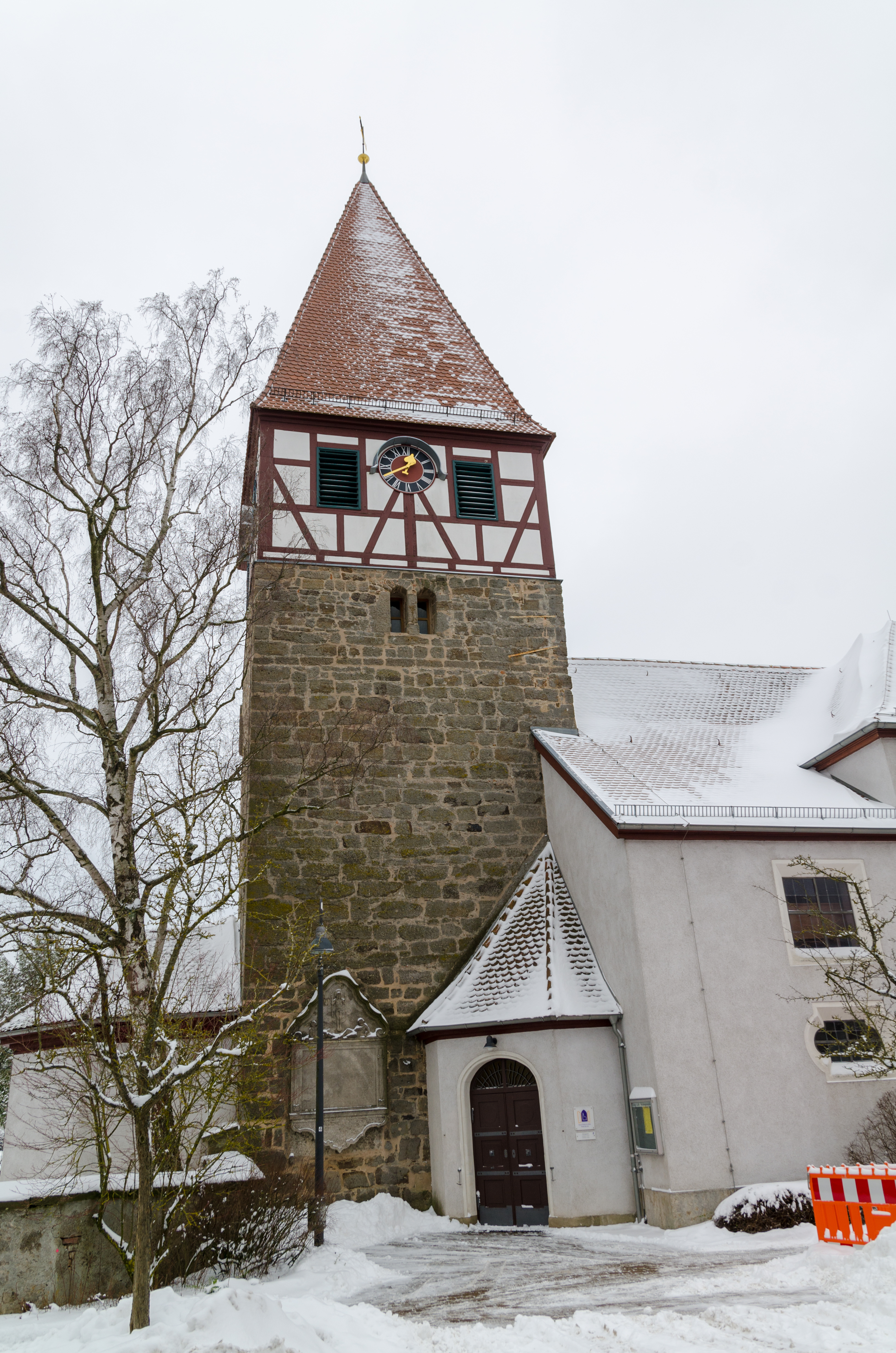 Evang-Luth. Kirche St. Laurentius in Elpersdorf